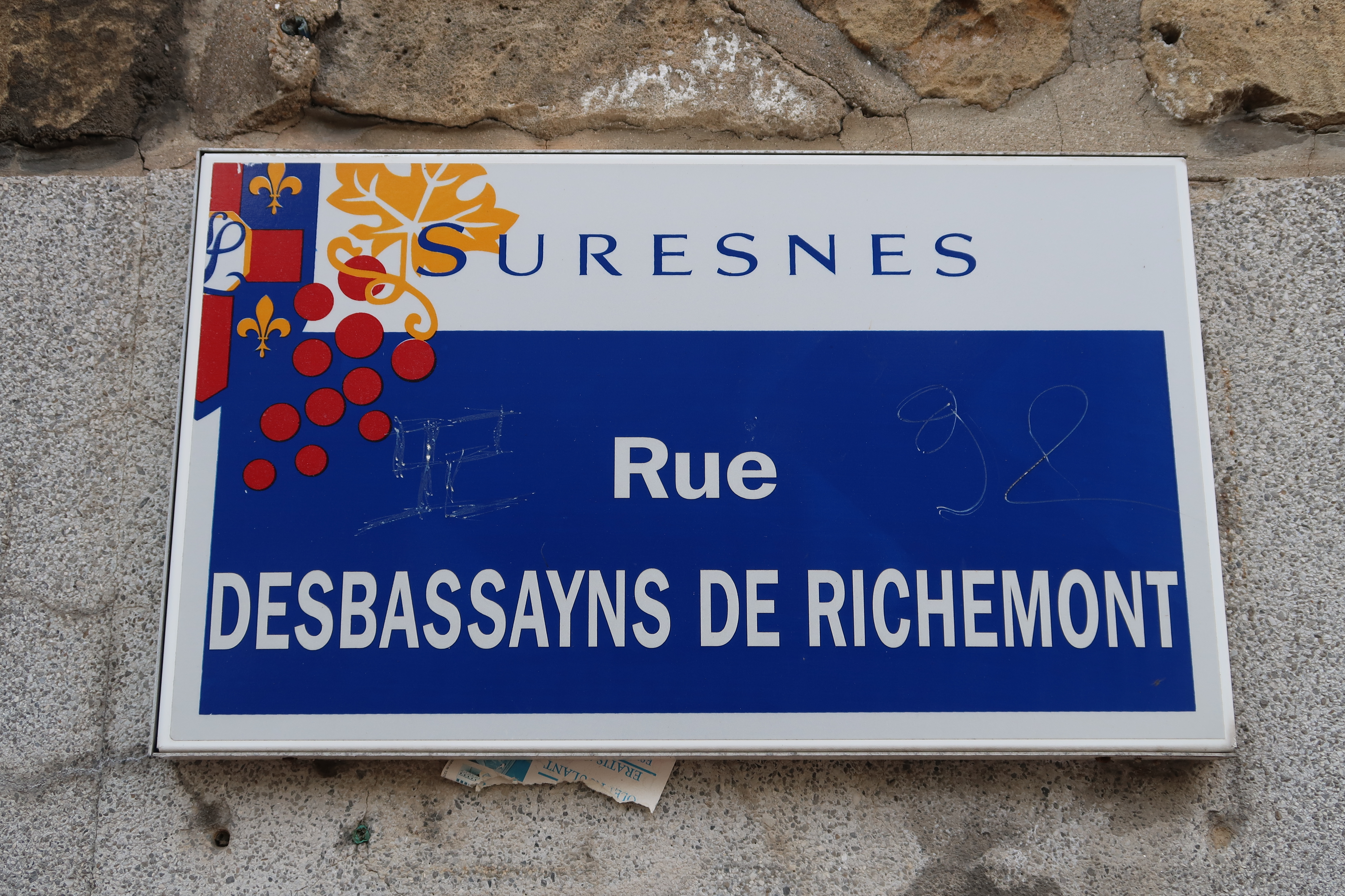 Plaque de la rue Desbassayns-de-Richemont à Suresnes (Hauts-de-Seine).